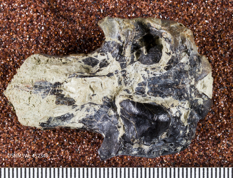 Metacheiromys marshi Wortman basicranium